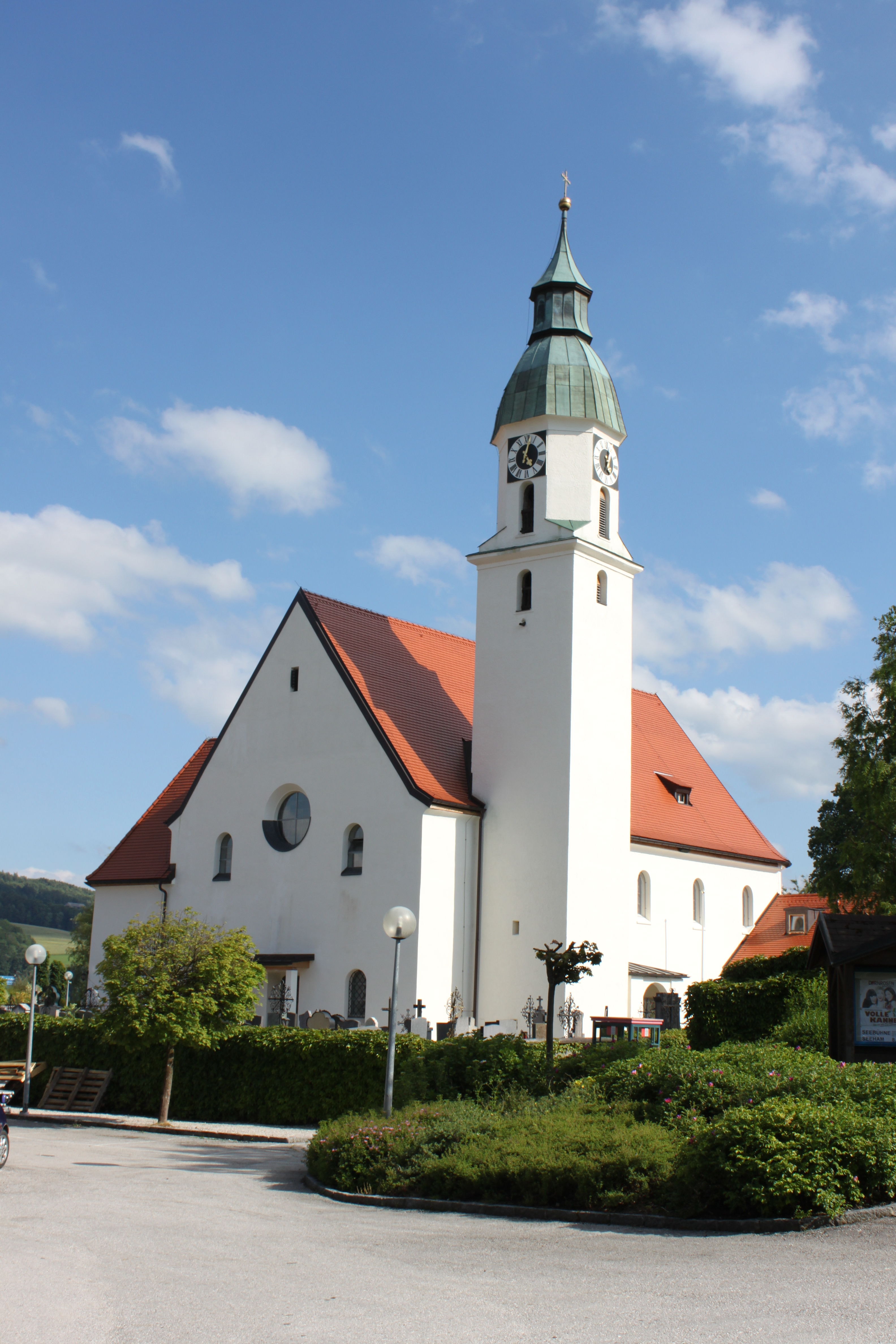 Kath. Pfarrkirche hl. Johannes der Täufer